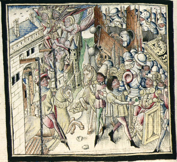 Champion des dames - Grenoble - Ms 352